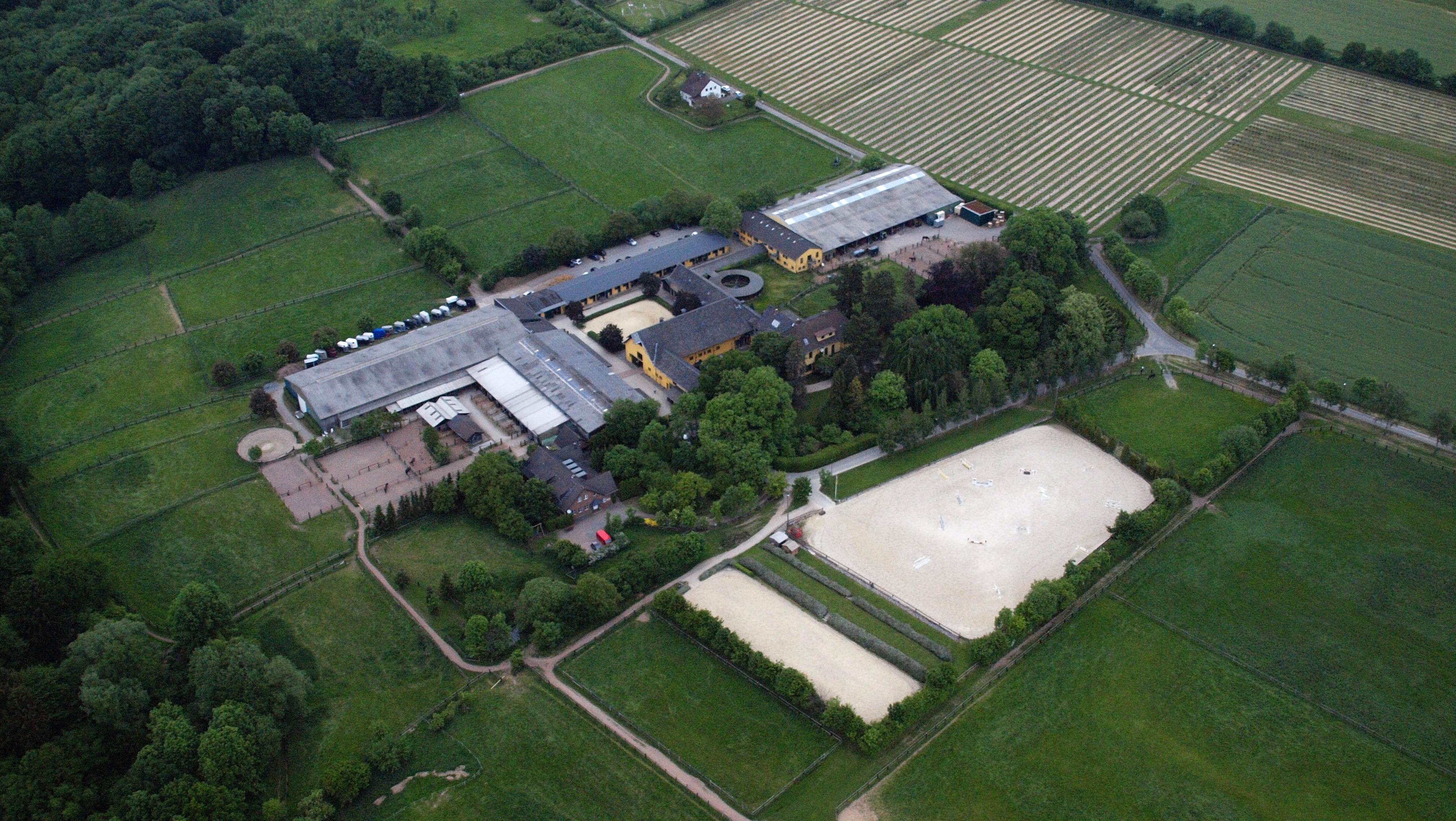 Gut Ettenhausen, Bonn-Hoholz: Luftaufnahme (2015)